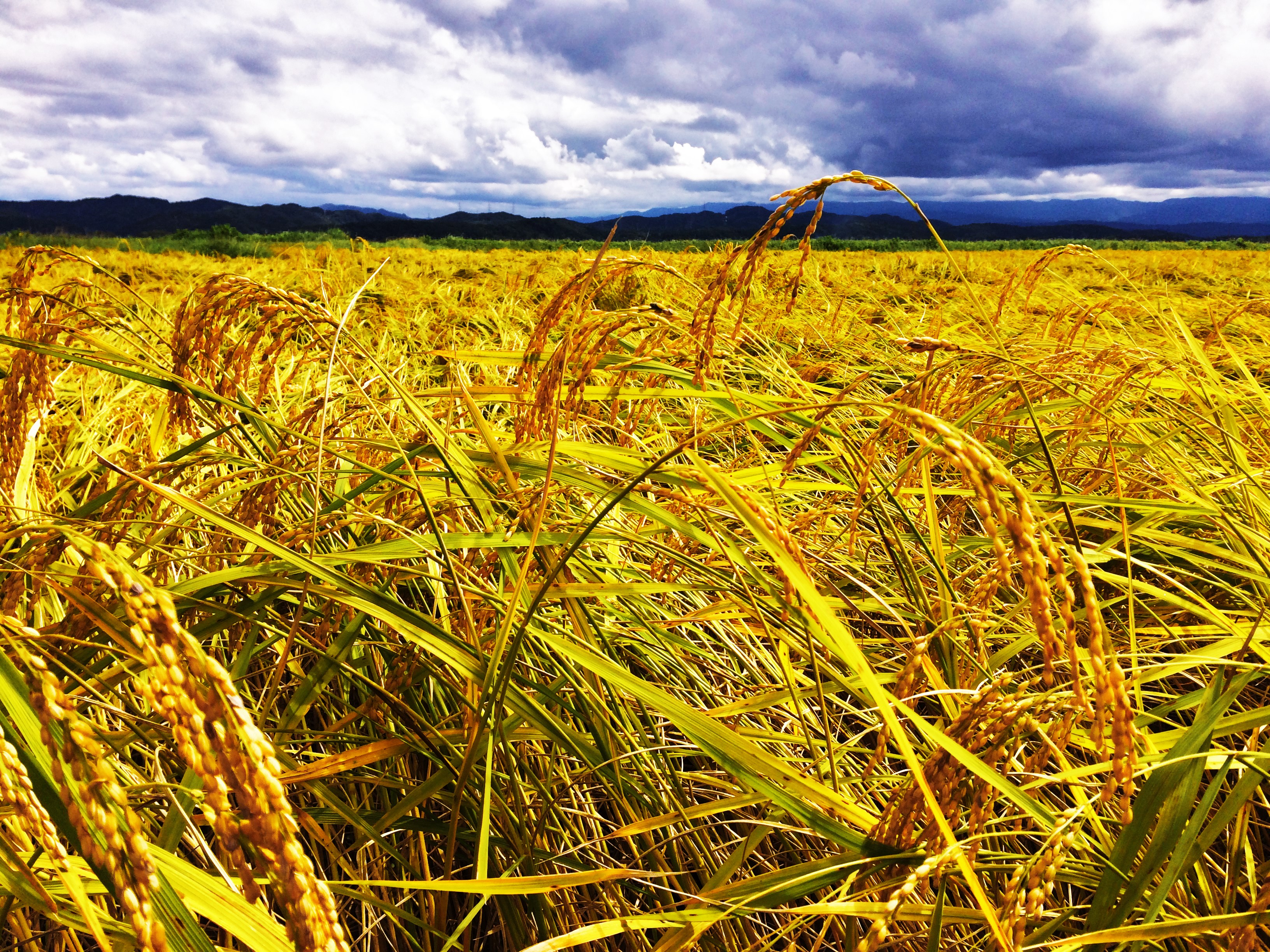 上越市大潟区大潟の景色